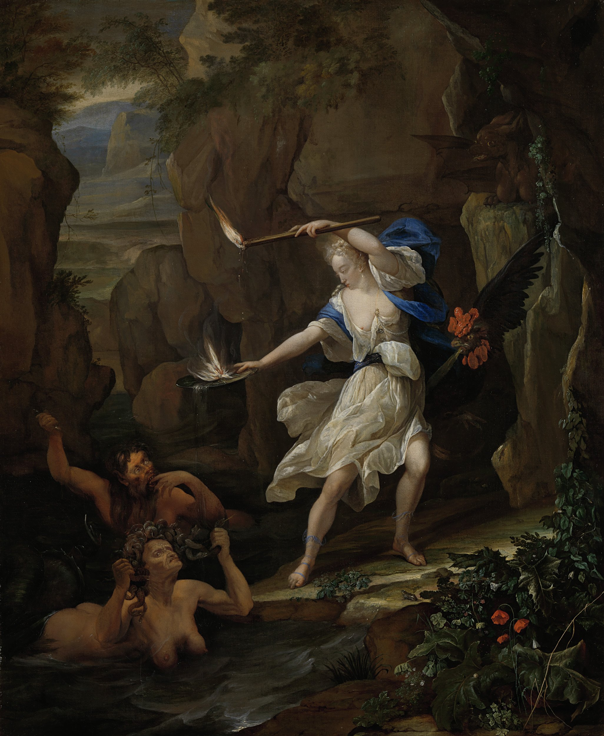 Circe straft Glaucus door Scylla in een monster te veranderen. De tovenares Circe staat rechts voor een rotswand met in de handen een brandende fakkel en een bord met vuur, in het water Scylla en Glaucus. Rechts op een rots kijkt een draak toe.; Eglon Hendrik van der Neer (1634–1703), olieverf op doek, 1695